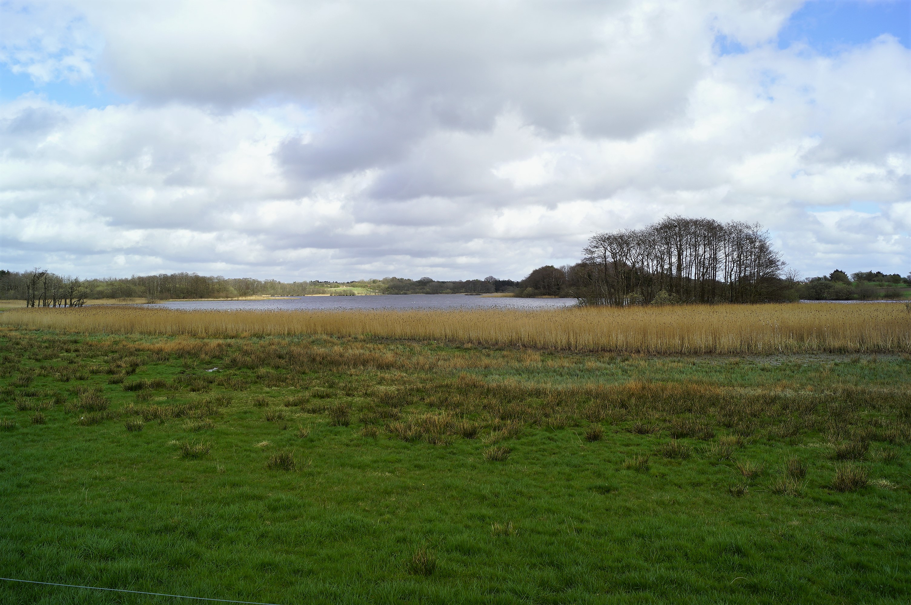 Nipsgård Sø set mod øst